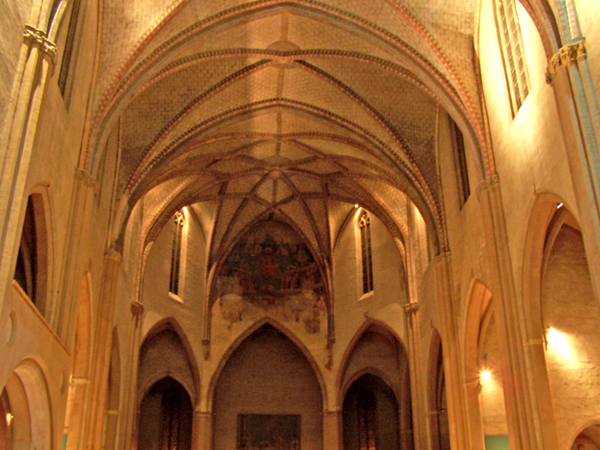 Voûte du chœur de la chapelle attenante au cloître au Musée des Augustins de Toulouse (France)